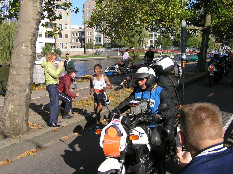 De Ethiopische renner Haile Gebrselassie even voorbij het 35-km-punt, op weg naar zijn parcoursrecord bij de marathon van Amsterdam op 16 oktober 2005.